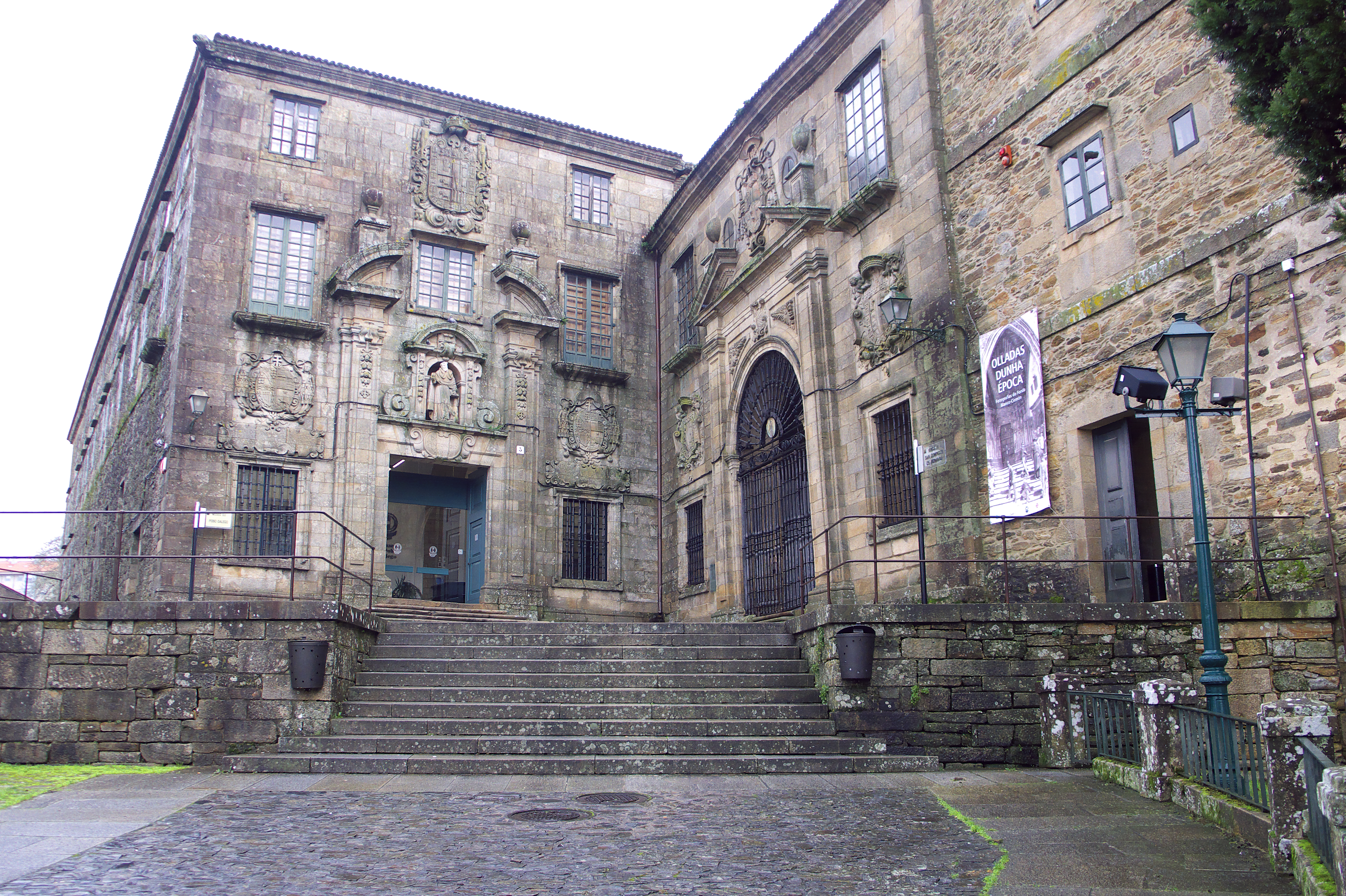 Entrada al convento y la iglesia. Patrocinio del Arzobispo Monroy. Director del proyecto, Domingo de Andrade, entre 1685 y 1715.